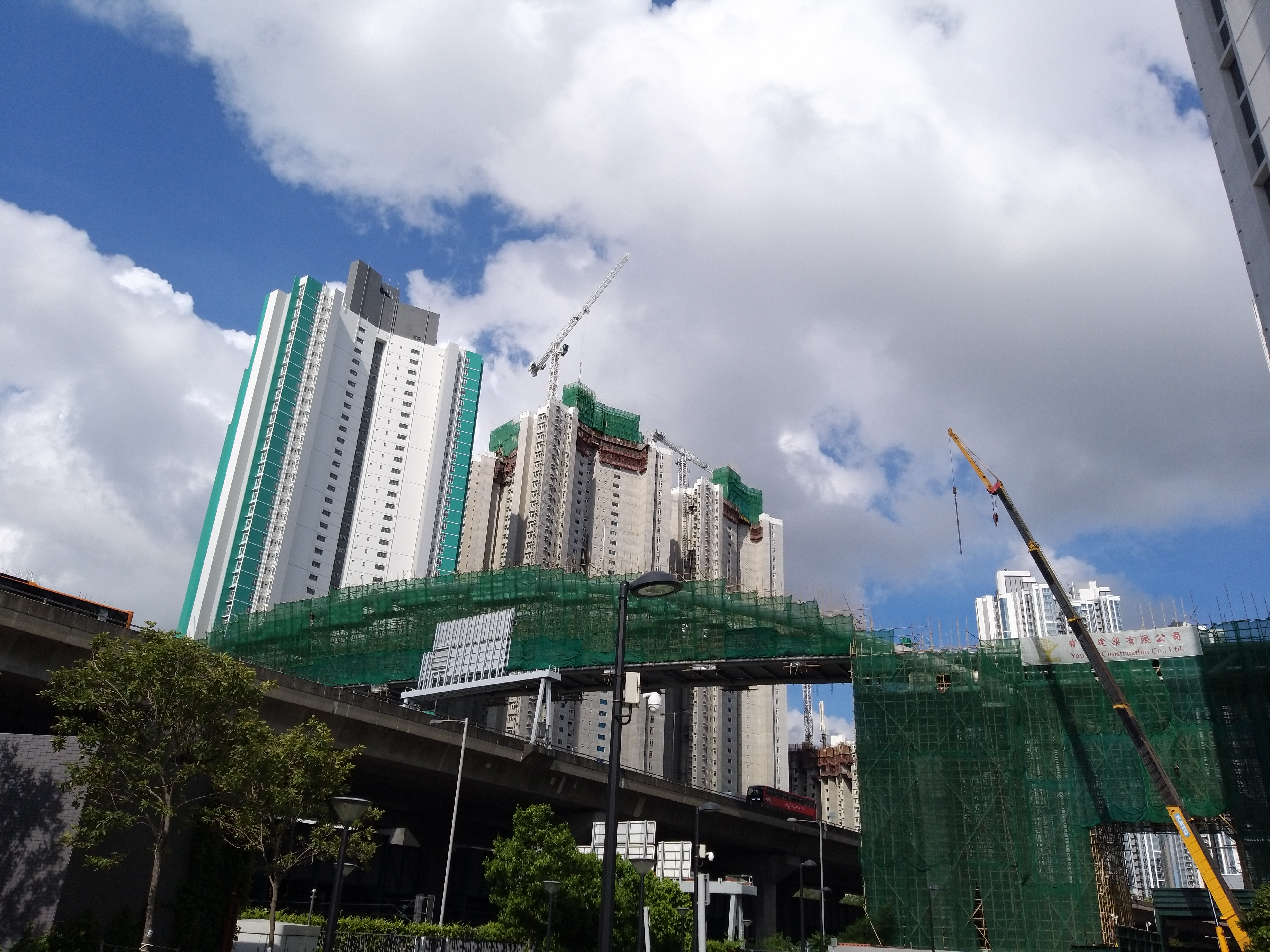 天橋繼續進行裝修工程，而海華及海昌樓正式到頂